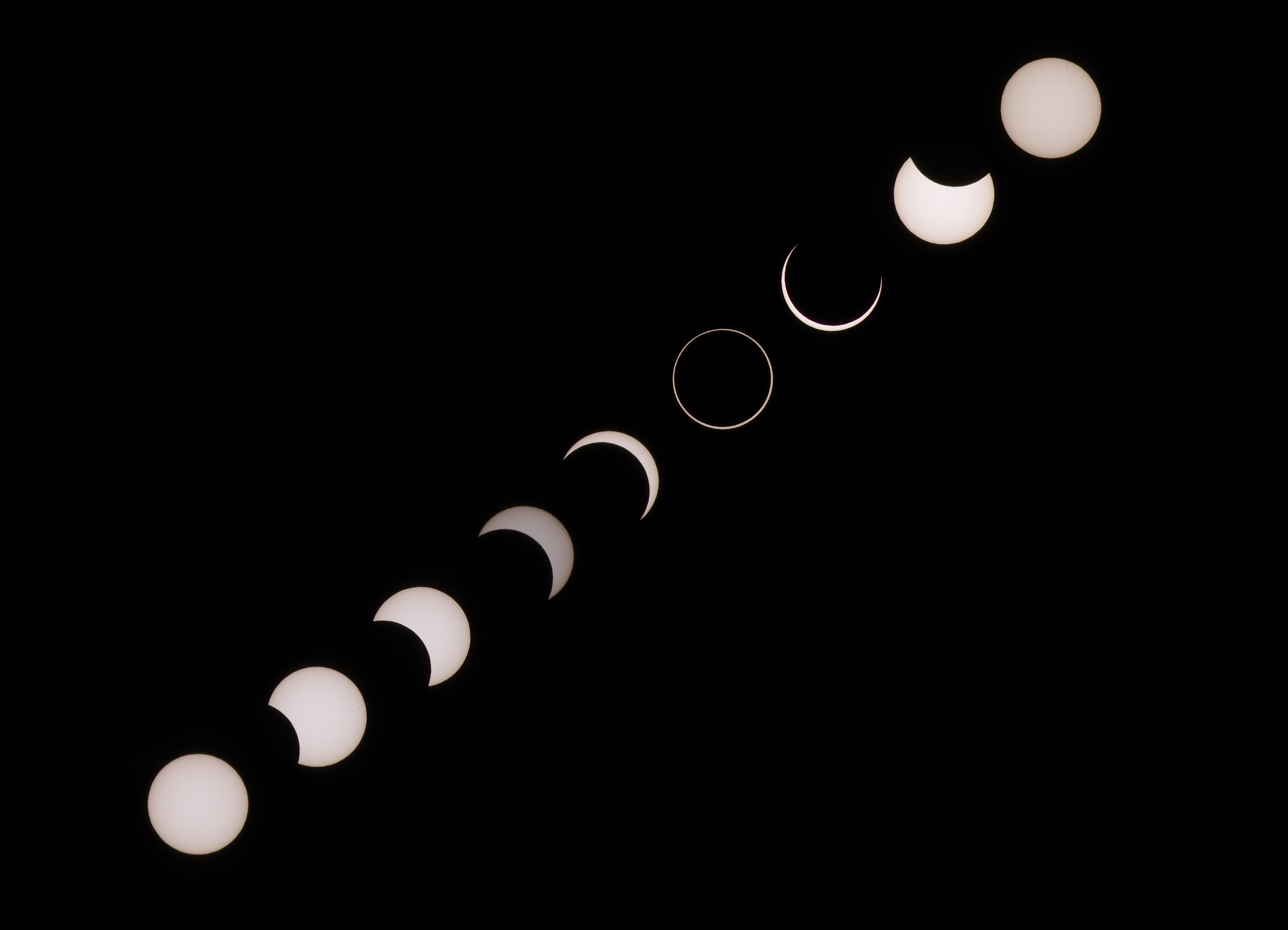 Composition des différentes phases de l'éclipse annulaire du 1er septembre 2016 depuis l'Etang Salé (Ile de la Réunion)